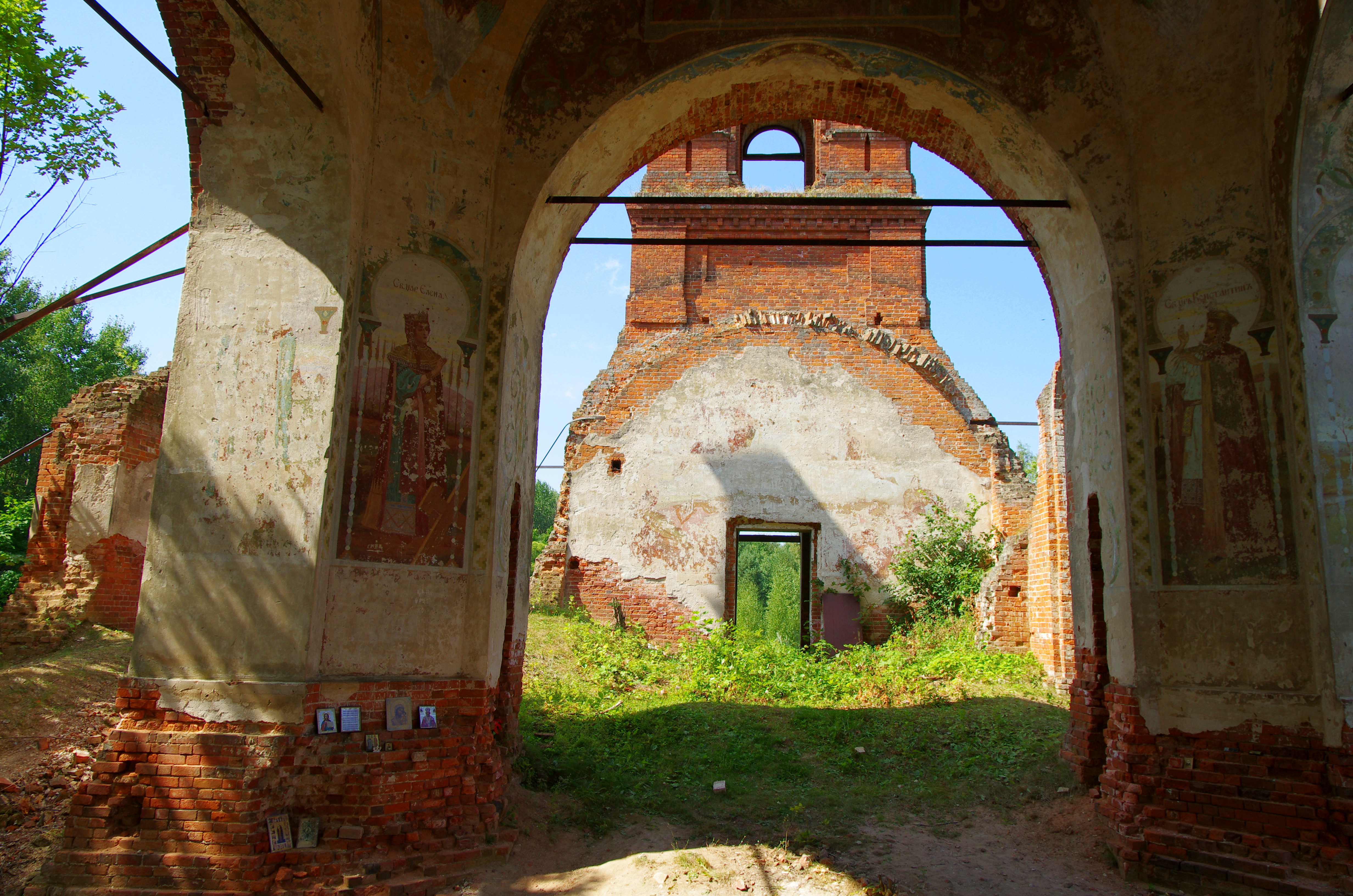 Церковь Николаевская с Ильинским приделом: Ялмонт, Клепиковский район, Рязанская область